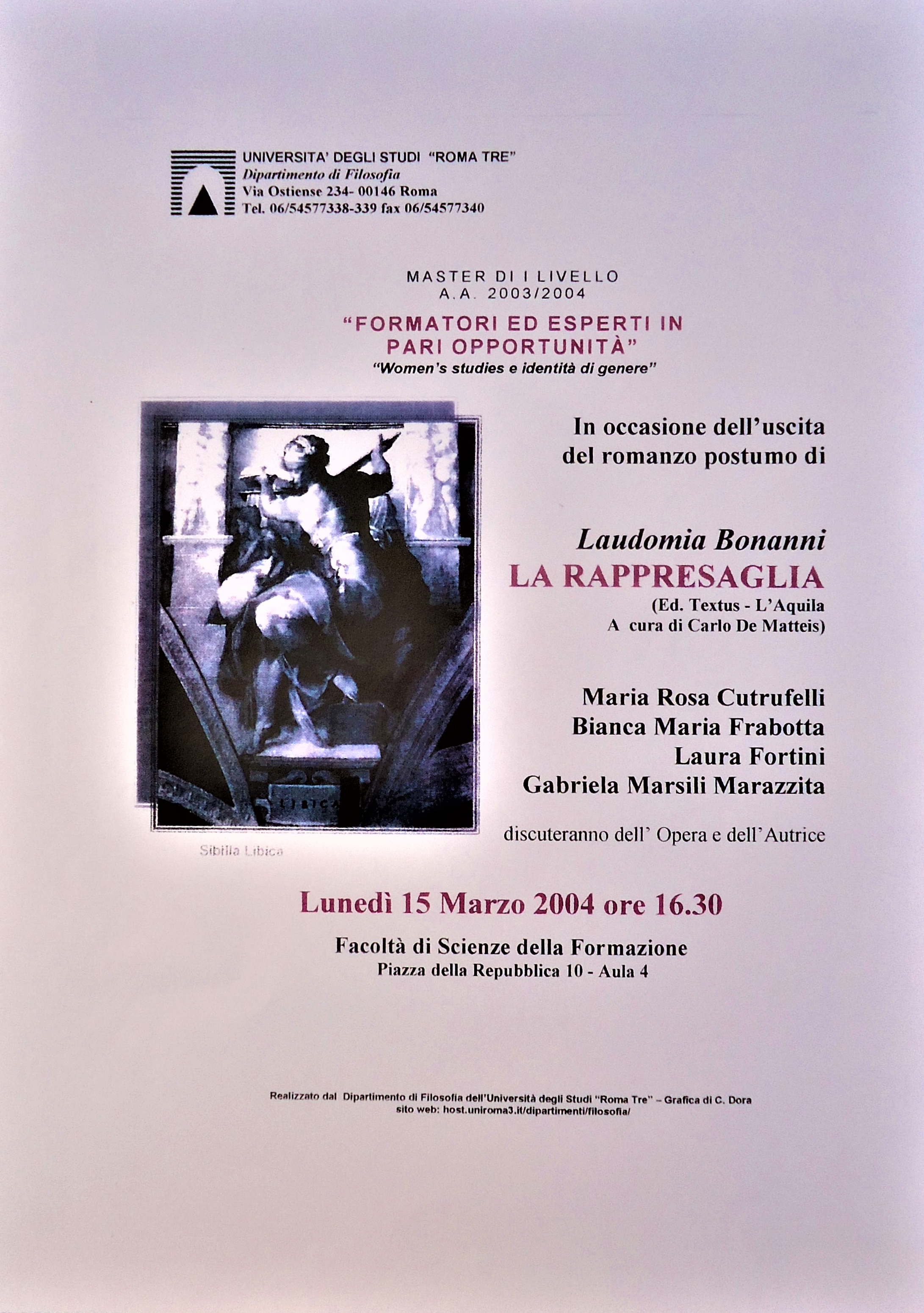 Interventi di: Maria Rosa Cutrufelli, Biancamaria Frabotta, Laura Fortini, Gabriella Marsili Marazzita. Facoltà di Scienze della Formazione. 15 marzo 2004. Locandina. Immagine: Michelangelo, Sibilla libica.